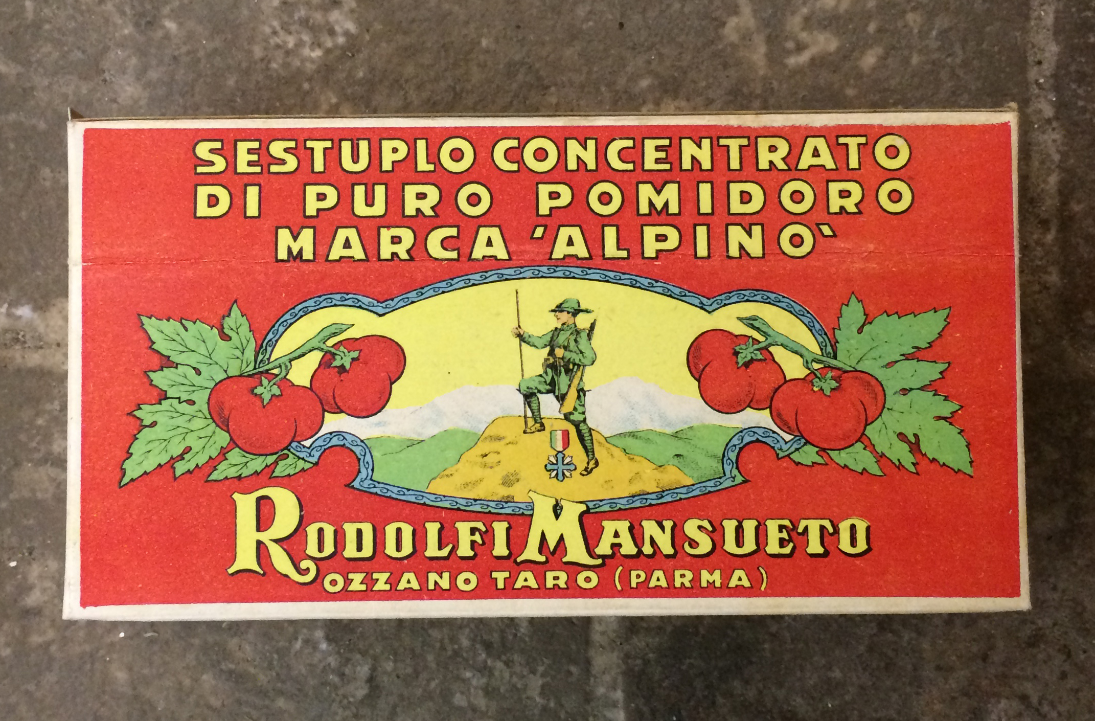 Scatola di confezionamento per sestuplo concentrato di pomodoro marca ‘Alpino’ della ditta Rodolfi Mansueto di Ozzano Taro (Pr).